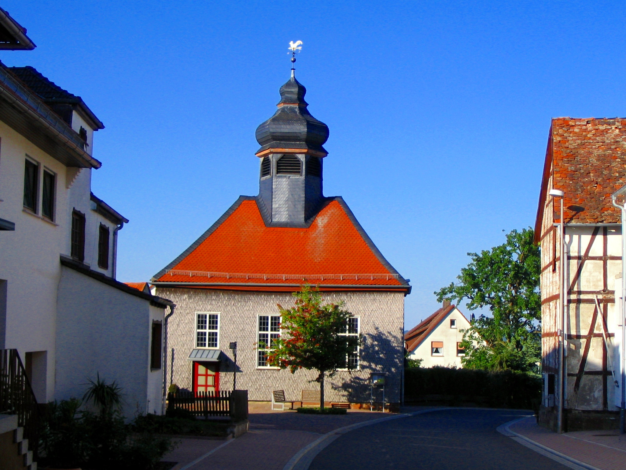 Dorfkirche in Frankenhain, Schwalm-Eder-Kreis-Hessen